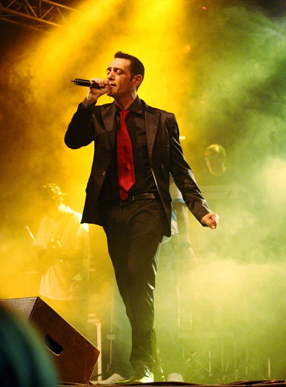 I Sud Sound System all'Estragon di Bologna